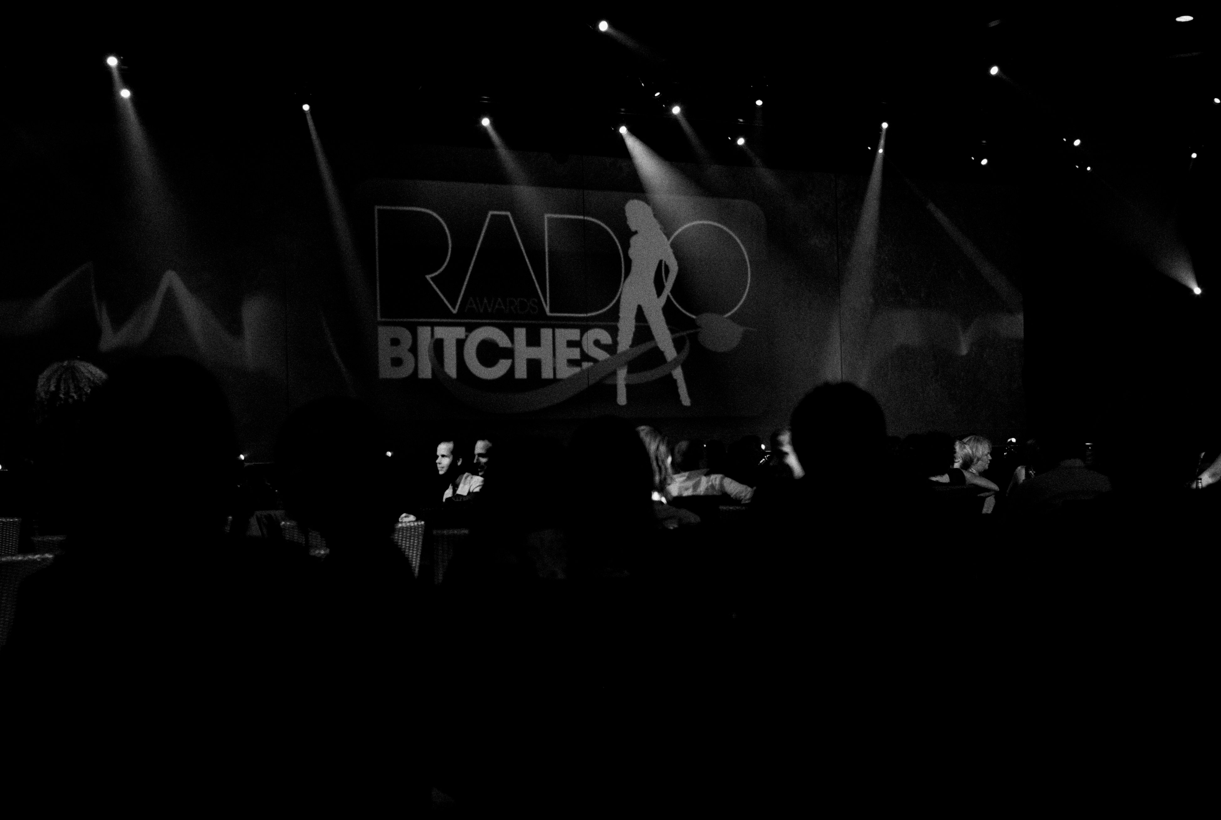 Het MPJC (Mediapark Jaarcongres) wordt op dinsdag 23 juni gehouden. Naast het plenaire congresprogramma zijn er ook andere activiteiten in en rondom studio 21, zoals het Spreek'buis pauzeprogramma, de grote jingles en tunes quiz met Kas van Iersel, Erik de Zwart en Gijs Staverman en na het MPJC de Radiobitches Awards.